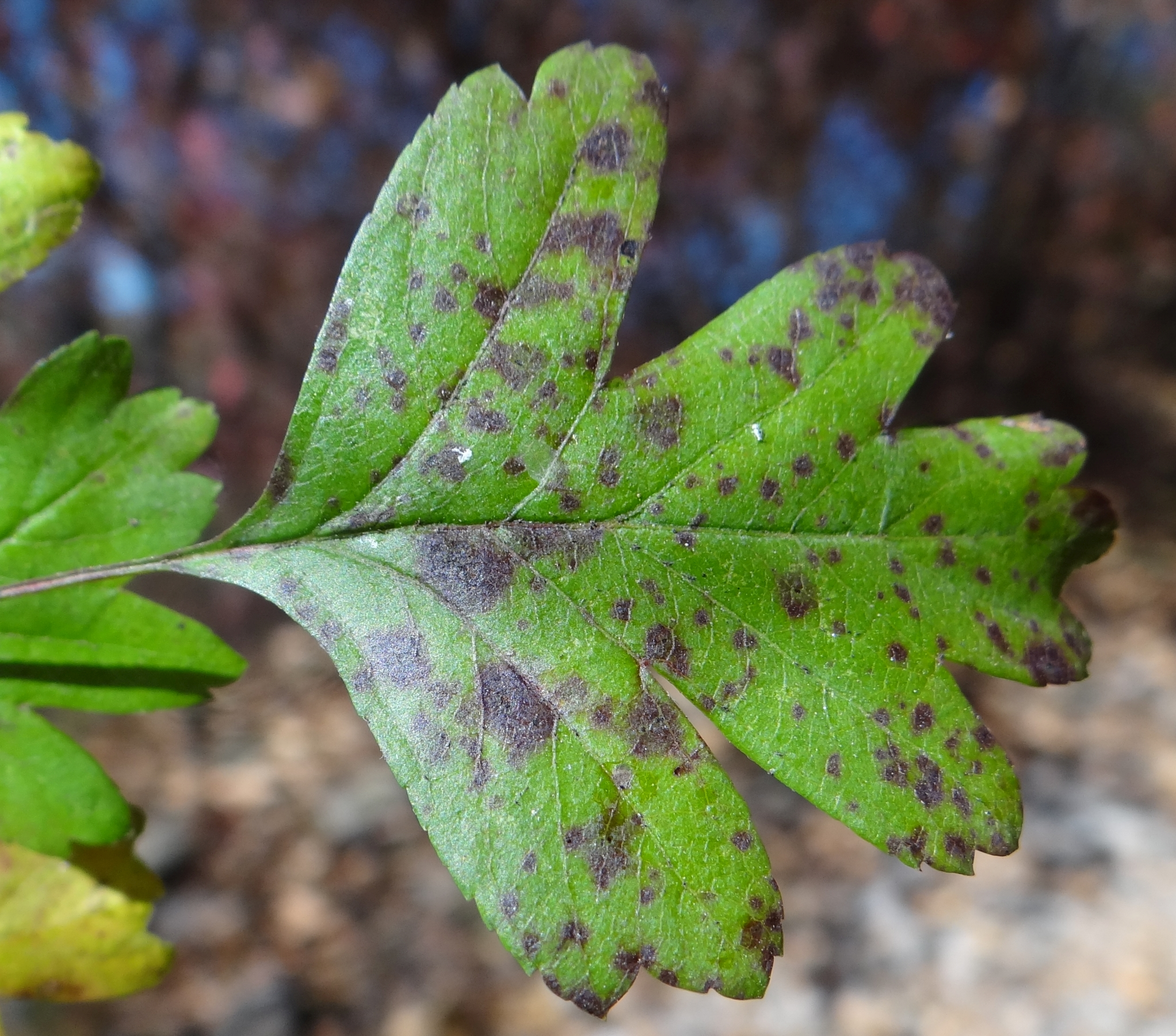 Monilinia johnsonii (anamorfa). Leaf spots on Crataegus monogyne. Location: Poland, Mszana Górna, Wsołowa